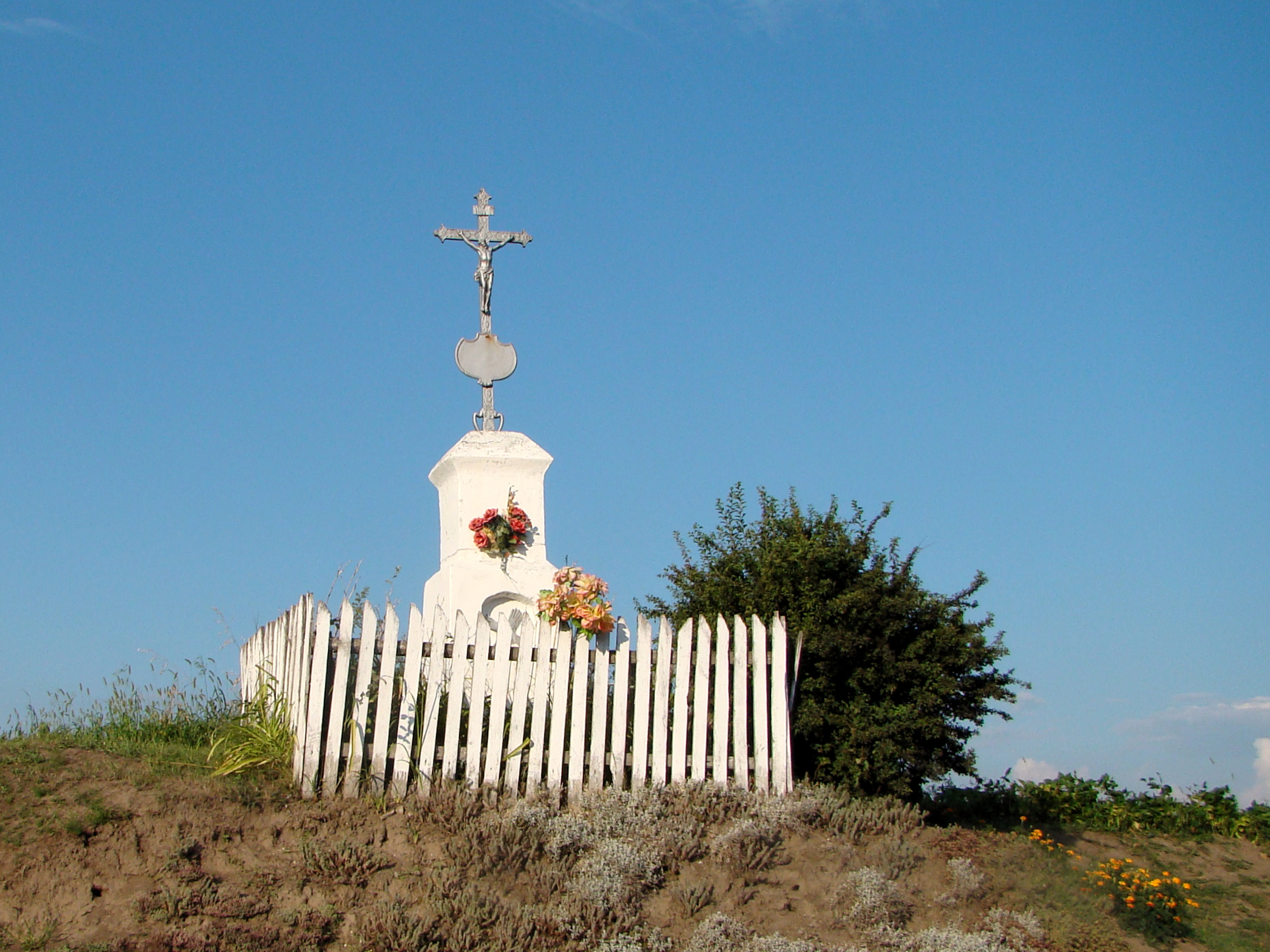 Kříž ve vesnici Chochłow, Polsko